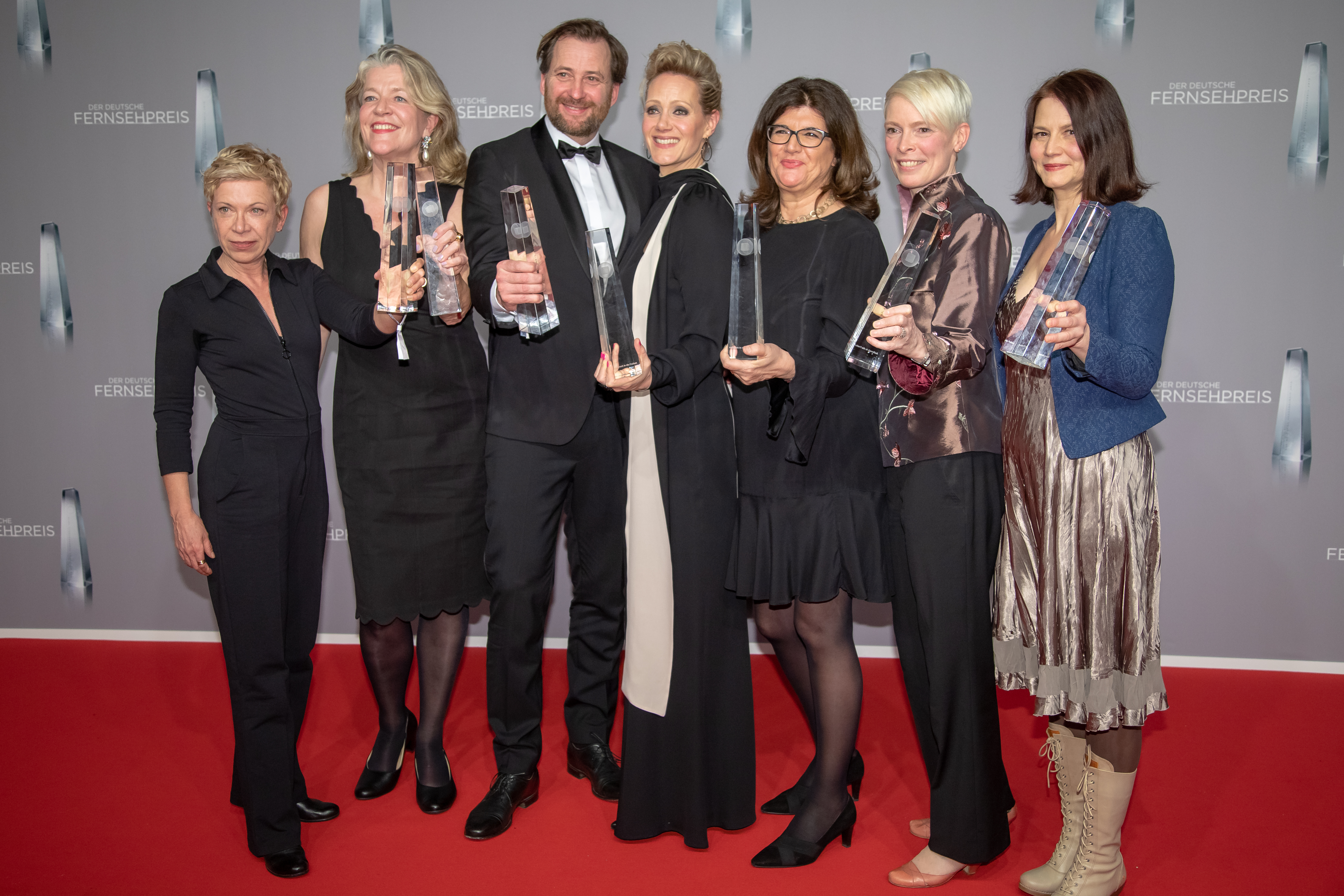 Cast Aufbruch in die Freiheit beim Deutschen Fernsehpreis 2019 in der Düsseldorfer Rheinterrasse